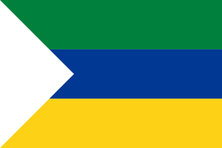 Bandera de Palanda